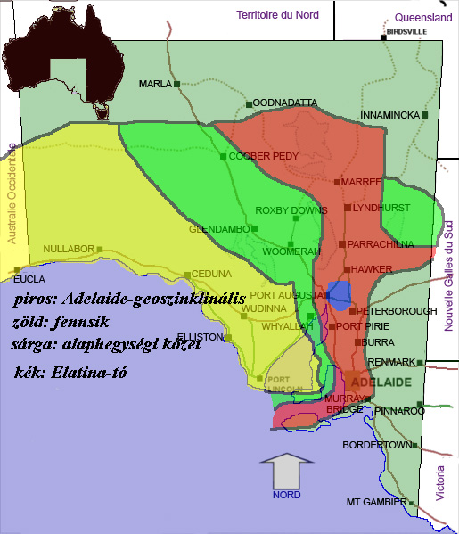 Az Elatina-tó (felső prekambrium) nagyszerkezeti térképe Ausztráliában